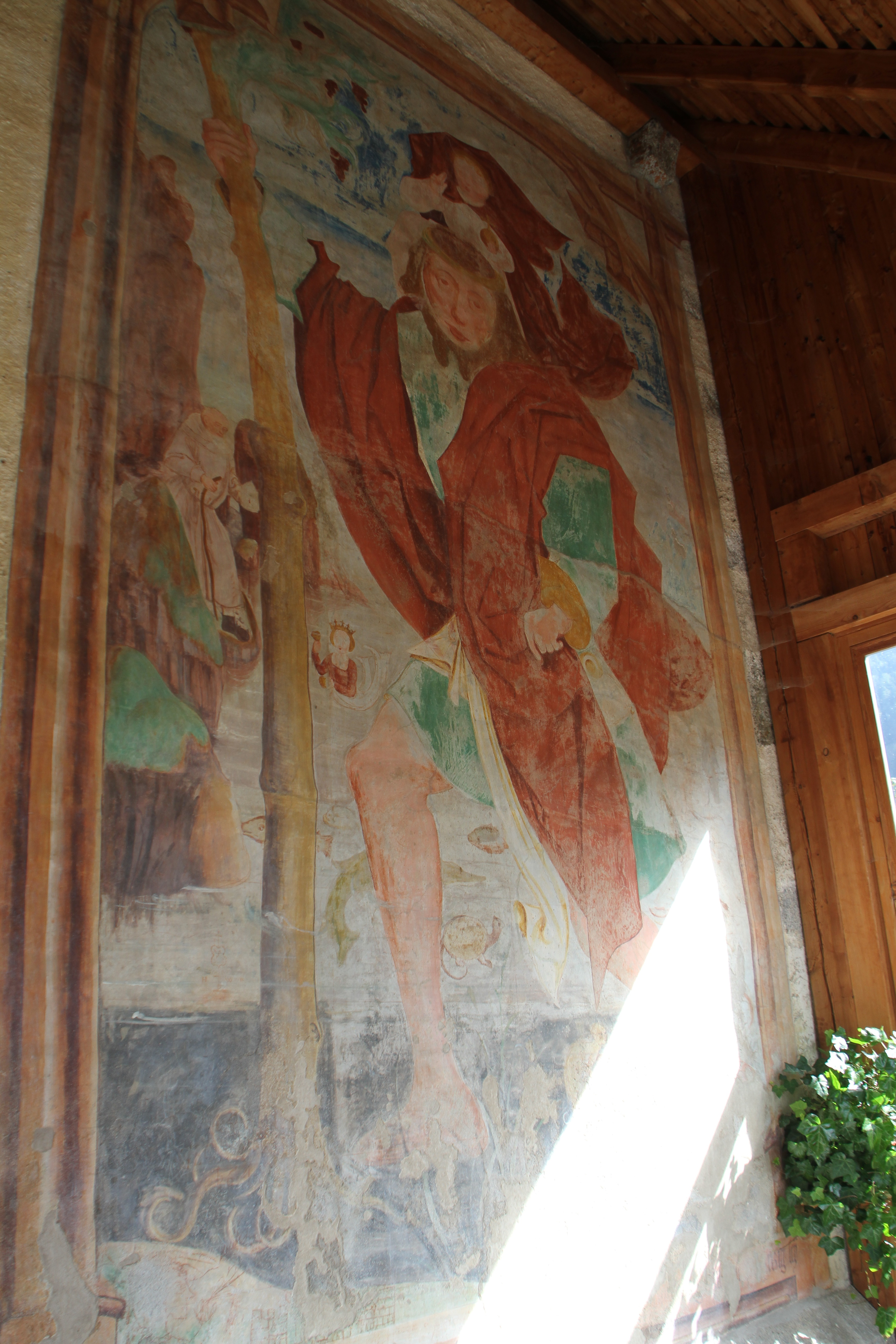 St. Peter und Paul in Pens (Sarntal, Südtirol); Fresko mit Christophorus, spätgotisch 1511